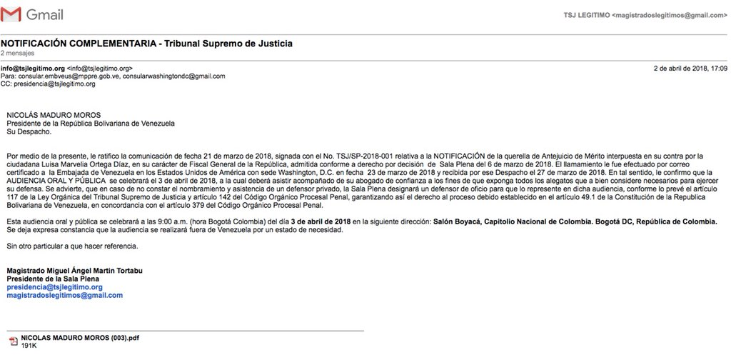 Notificación de antejuicio de mérito de Nicolás Maduro por parte del Tribunal Supremo de Justicia de Venezuela en el exterior. "@NicolasMaduro En el uso de las atribuciones que confiere el art. 91.3 de la Ley Orgánica del Tribunal Supremo de Justicia, procedemos a notificarlos a través de cuenta Twitter, por ser un canal idóneo para tal acto. Mag. Miguel Martín Presidente de la Sala Plena"